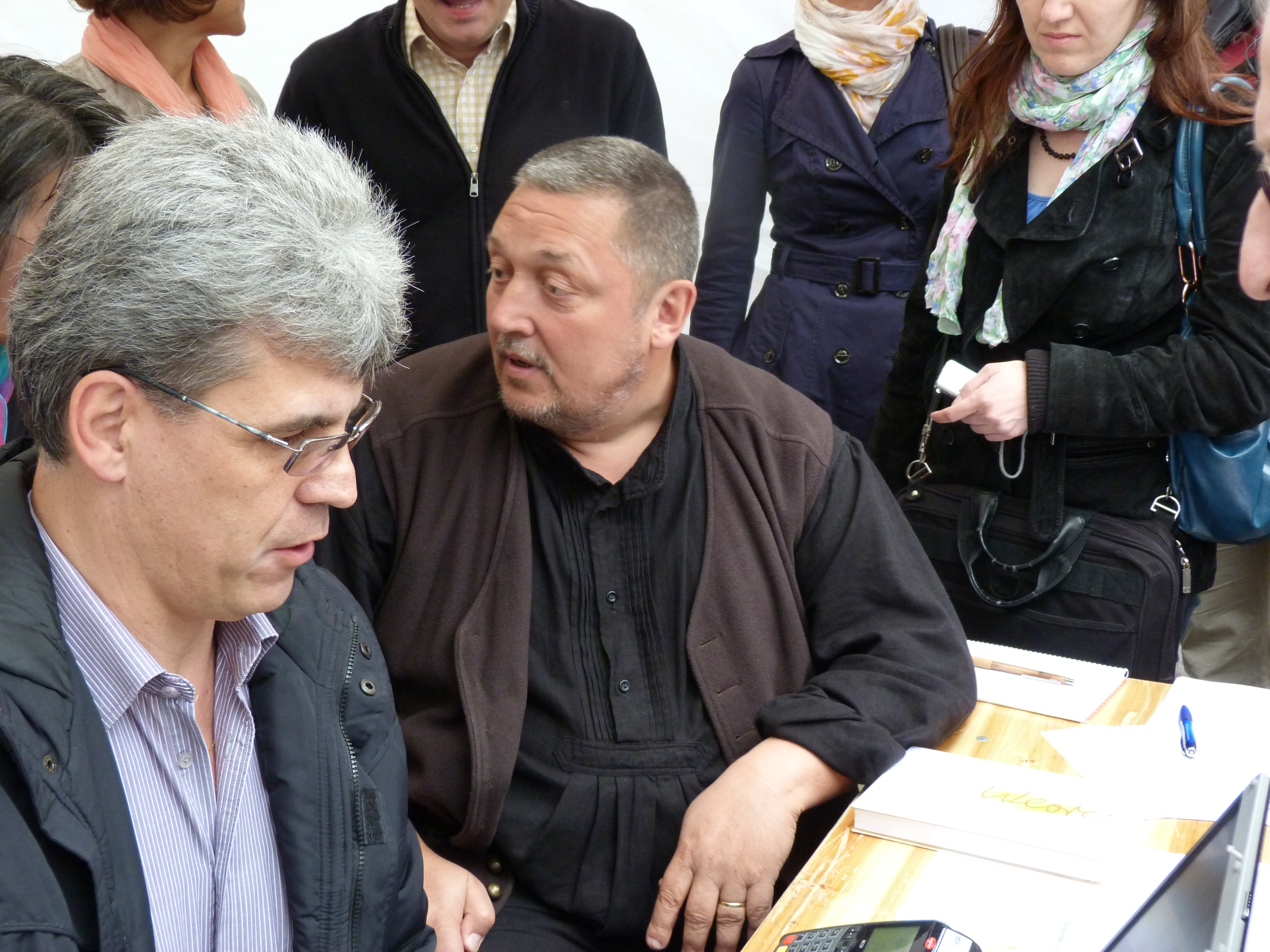 Live on the 26th of May, 2013. Vörösmarty square, Downtown Budapest. Attila Vidnyánszky, newly appointed director of the Nemzeti Színház (National Theatre) of Hungary sold tickets for the first premier of the Autumn season. Vidnyánszky greated the ticket buyers one by one, chatting with each one. Áron Tamási: Vitéz lélek. A felvétel 2013. Május 26 –án, vasárnap délután készült Budapesten, a Vörösmarty téren. Vidnyánszky az árusító sátorban (1), a vásárlók sora (2,3). 16 óra után Vidnyánszky Attila, a Nemzeti Színház hamarosan hivatalba lépő új igazgatója, jegyet árusított az új évad első előadására, Tamási Áron Vitéz lélek című darabjának 2013. Szeptember 27 –i bemutatójára. A darabot Vidnyánszky Attila rendezte, aki mellett ott voltak a főszerepeket alakítók: Trill Zsolt, Martinovics Dorina. Vidnyánszky jókívánságai mellett minden jegyet vásárlóval kezet fogott és elbeszélgetett. ©© Derzsi Elekes Andor, Budapest, 2013, You are authorised to use these photos and vids under Creative Commons – even for commercial, for profit purposes. Photos must be attributed to Derzsi Elekes Andor. All of the photos and vids in the Metapolisz DVD line are under Creative Commons and can be used even for commercial – for profit – purposes. Recommended Citation Derzsi Elekes Andor: Metapolisz DVD line